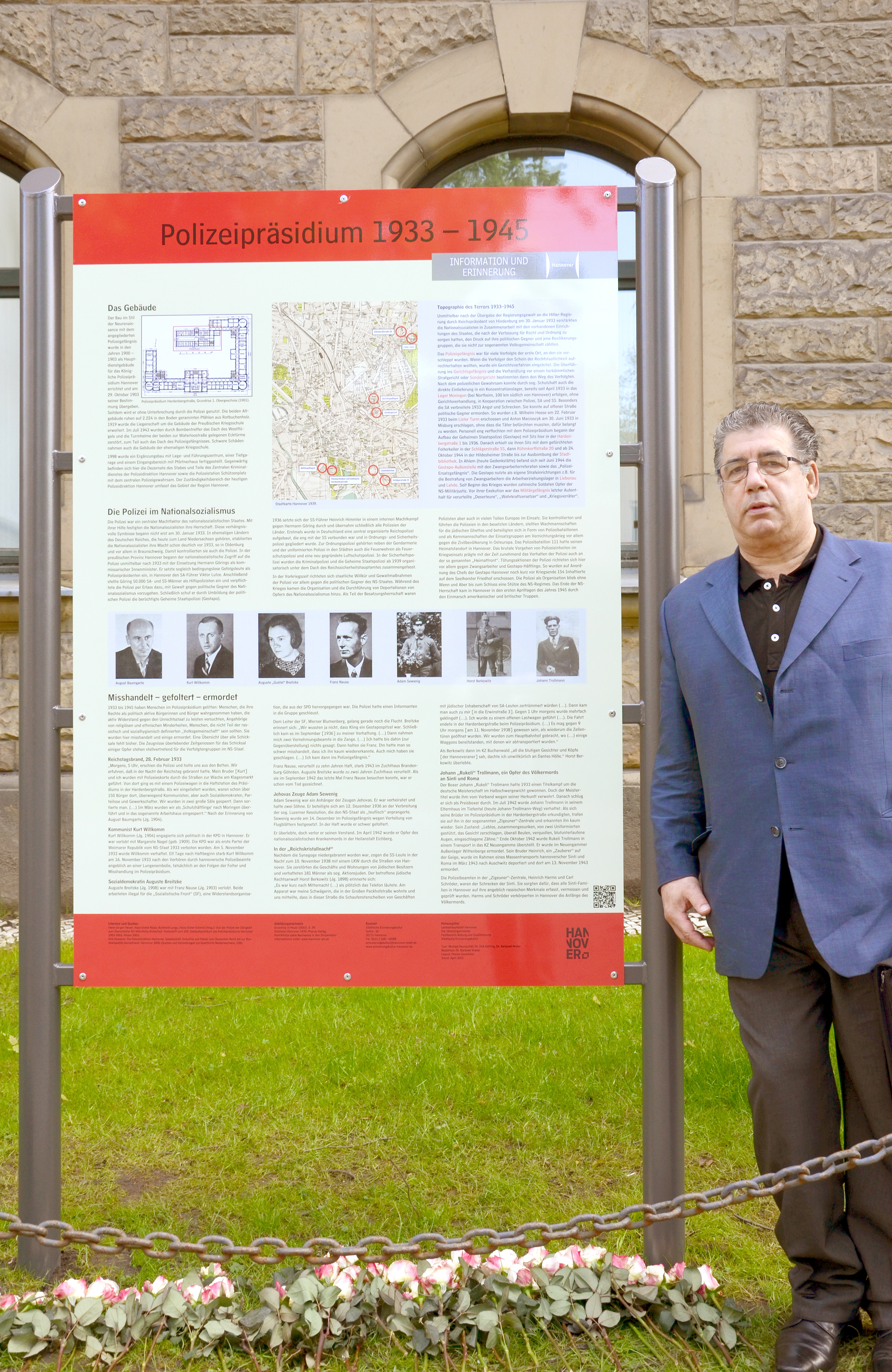 Zur Eröffnung der von der Deutschen Hochschule der Polizei und dem Deutschen Historischen Museum konzipierten Wanderausstellung Ordnung und Vernichtung. Die Polizei im NS-Staat, die vom 5. Mai bis 14. Juni 2015 in der Polizeidirektion Hannover mit ergänzendem niedersächsischen Schwerpunkt gezeigt wird, enthüllten Polizeipräsident Volker Kluwe und Bürgermeister Thomas Hermann im Beisein zahlreicher Interessierter und Persönlichkeiten des öffentlichen Lebens vor dem Hauptgebäude in der Hardenbergstraße eine Informations- und Gedenktafel ...